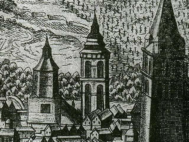 В центрі - Вежа Корнякта. Малюнок Пассаротті 1618 (за іншими даними 1617).